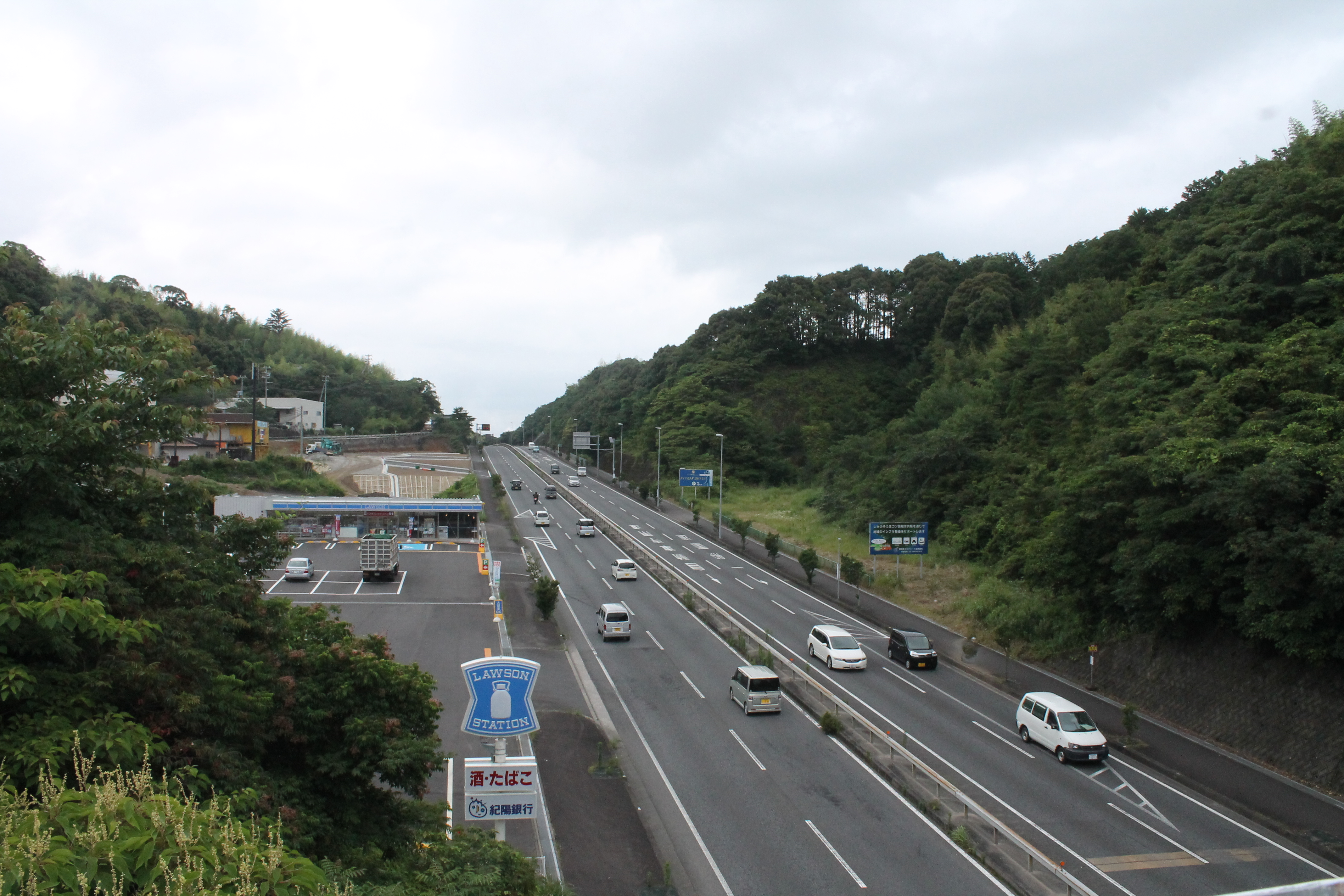 新宮インターから新宮方面をのぞむ